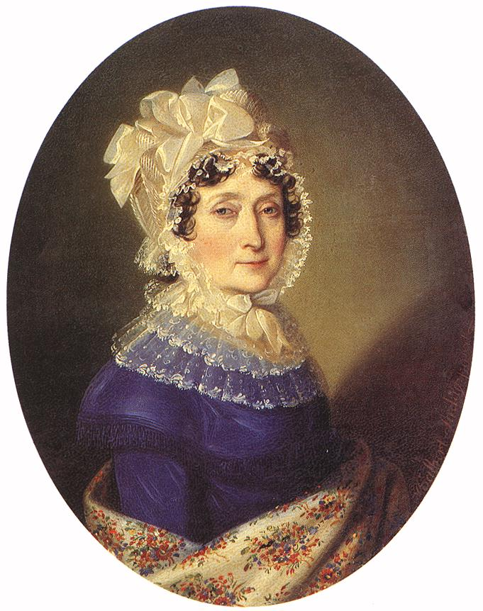 Portrait of Countess Ferencné Széchényi, Julianna Festetich